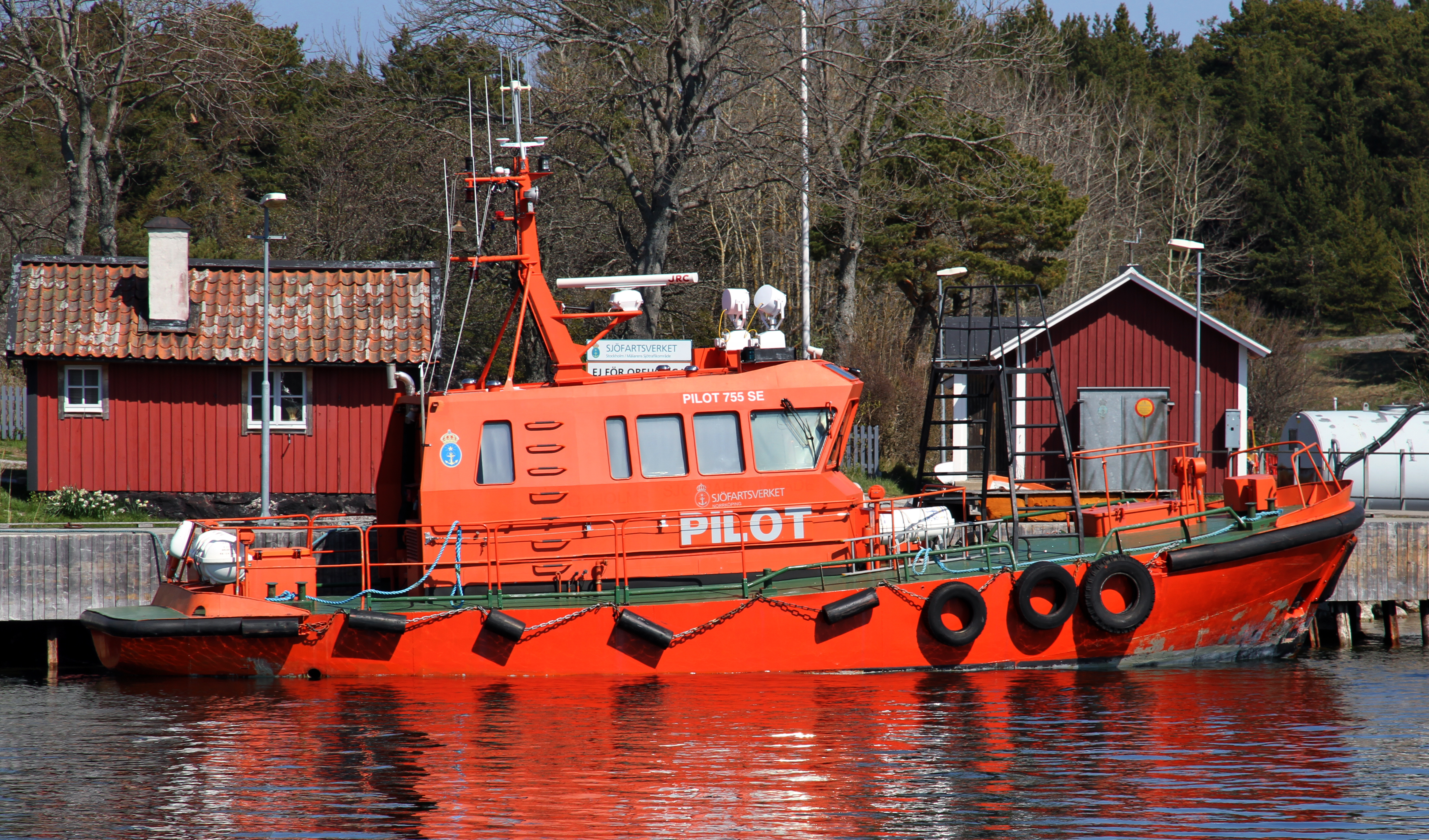 Pilot 755 SE i Sandhamn 7 maj 2011.